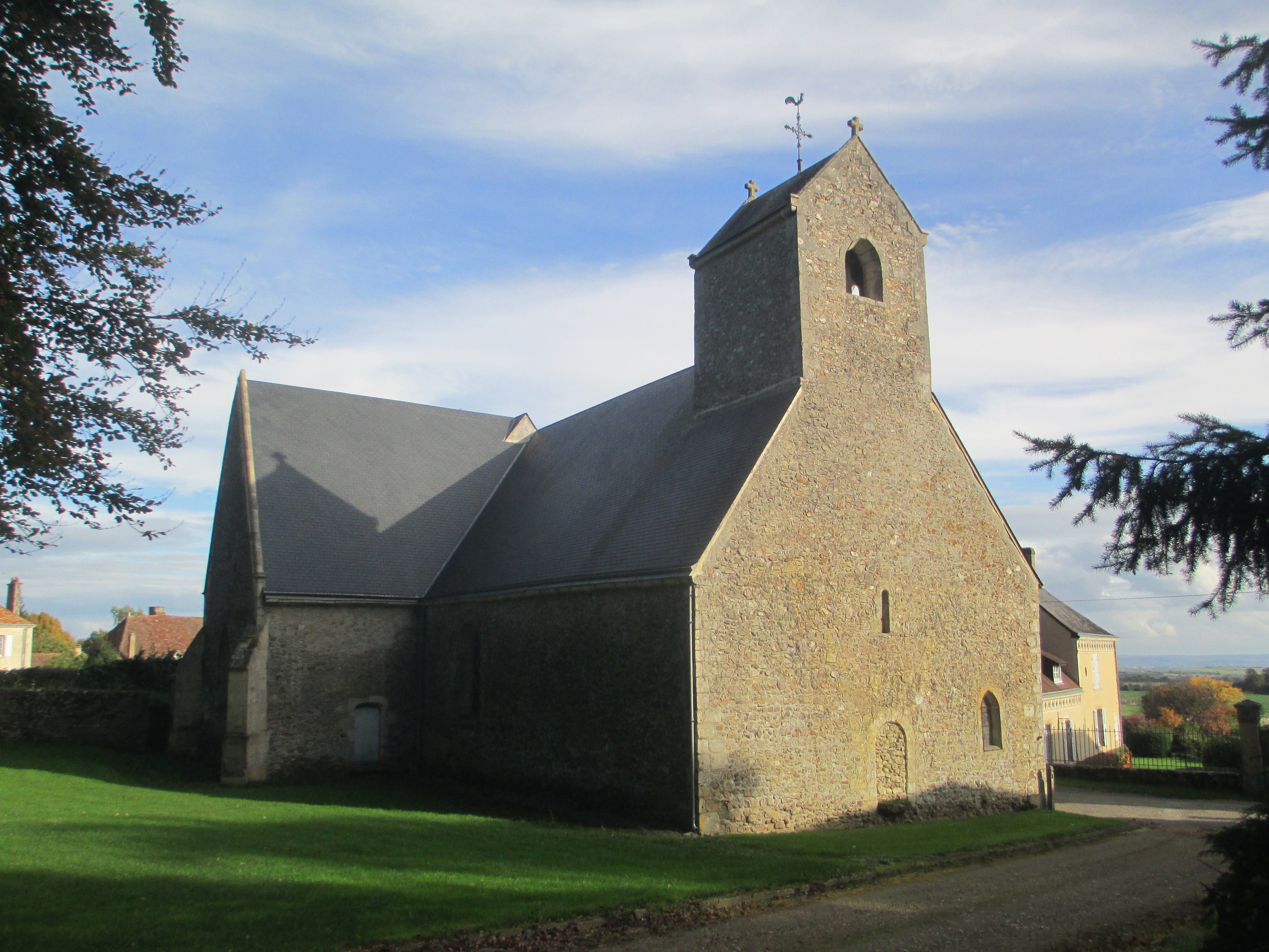 Église Saint-Denis d'Aillières, à Aillières-Beauvoir, dans la Sarthe.